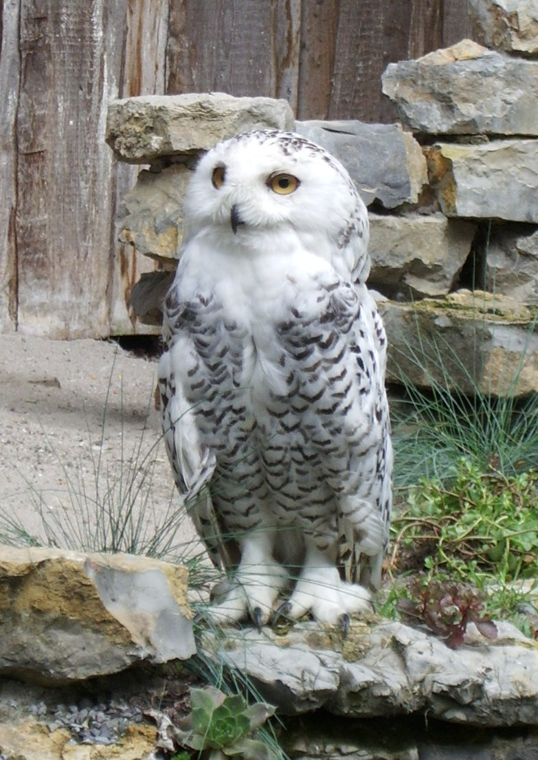 Schnee-Eule im Zoo Karlsruhe